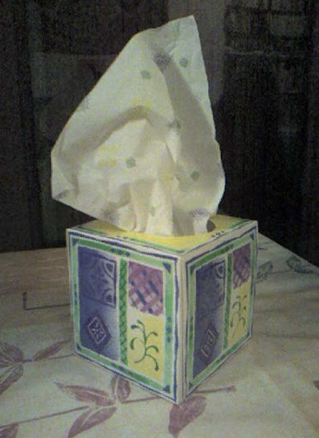 Une boîte de mouchoirs en papier, de forme cubique et non rectangulaire.